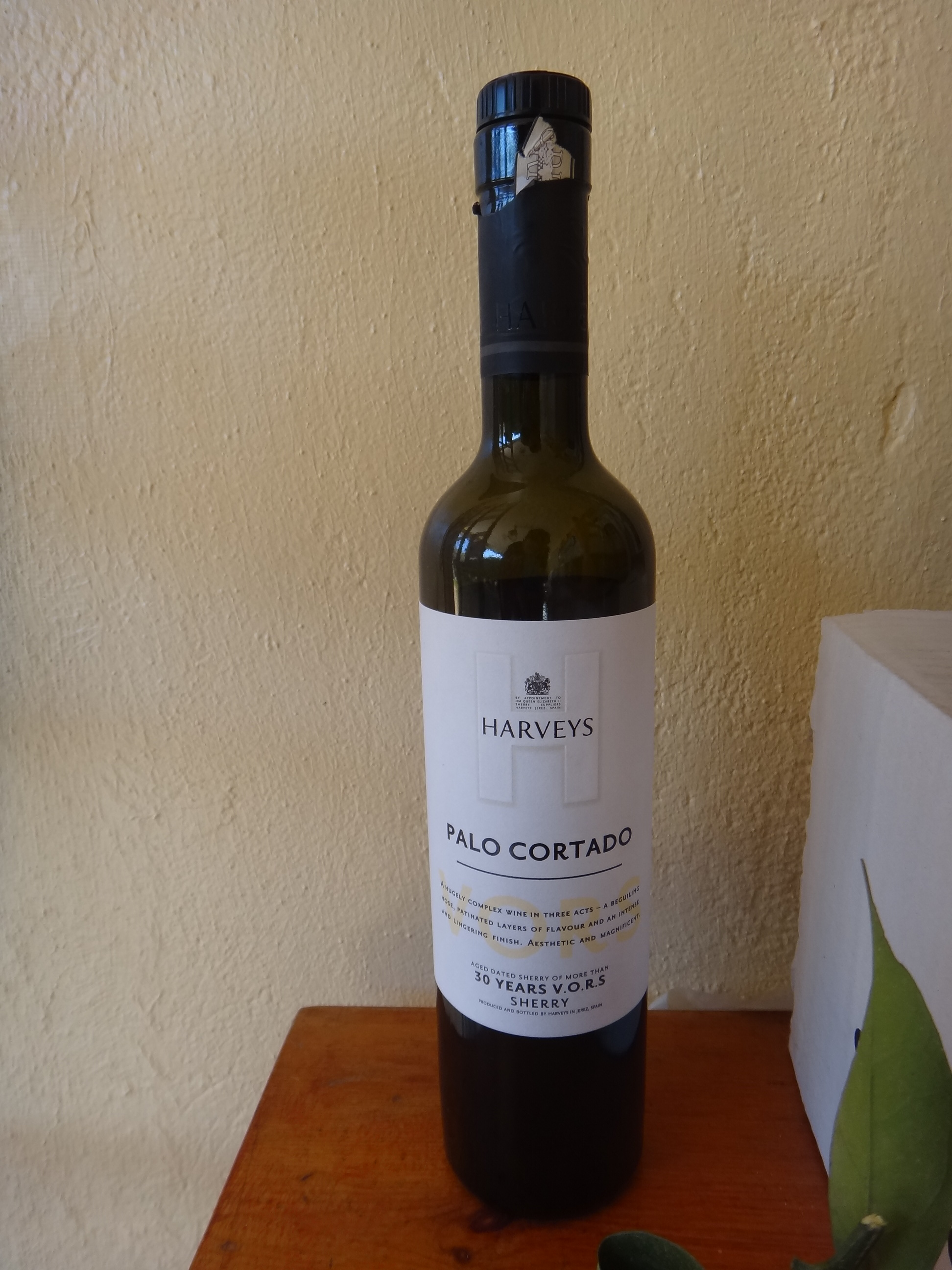 Frente de botella de Palo Cortado (Jerez - Sherry)